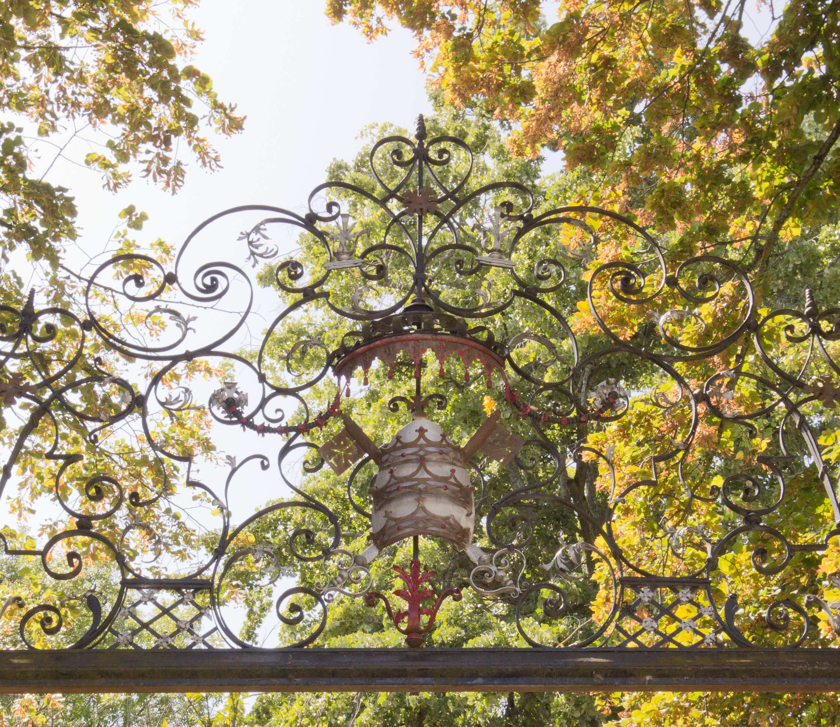 Le blason du Vatican figure au dessus du portail en fer forgé du château de Dully.